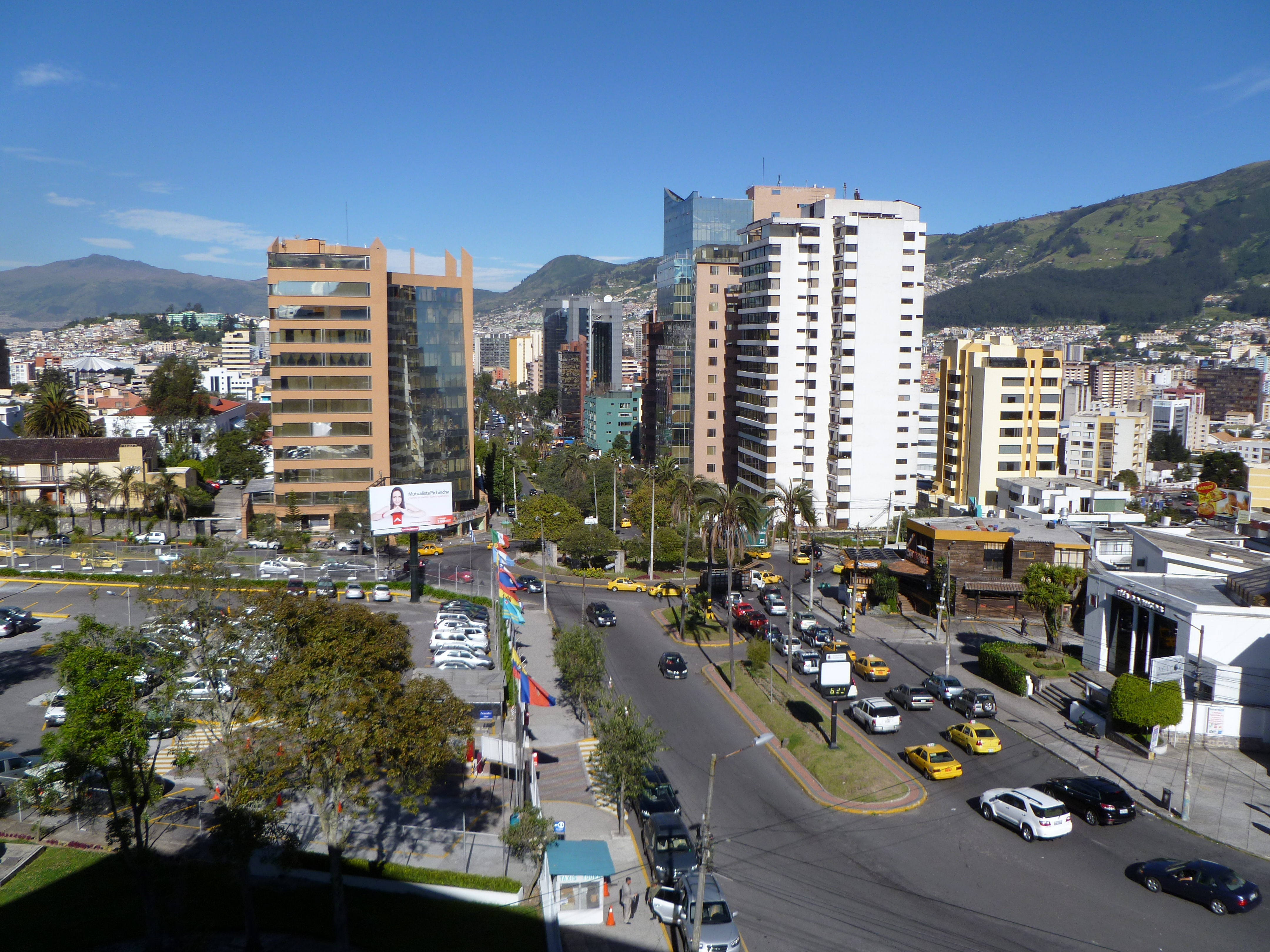 Quito in 2010